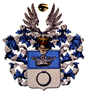 Vaakuna